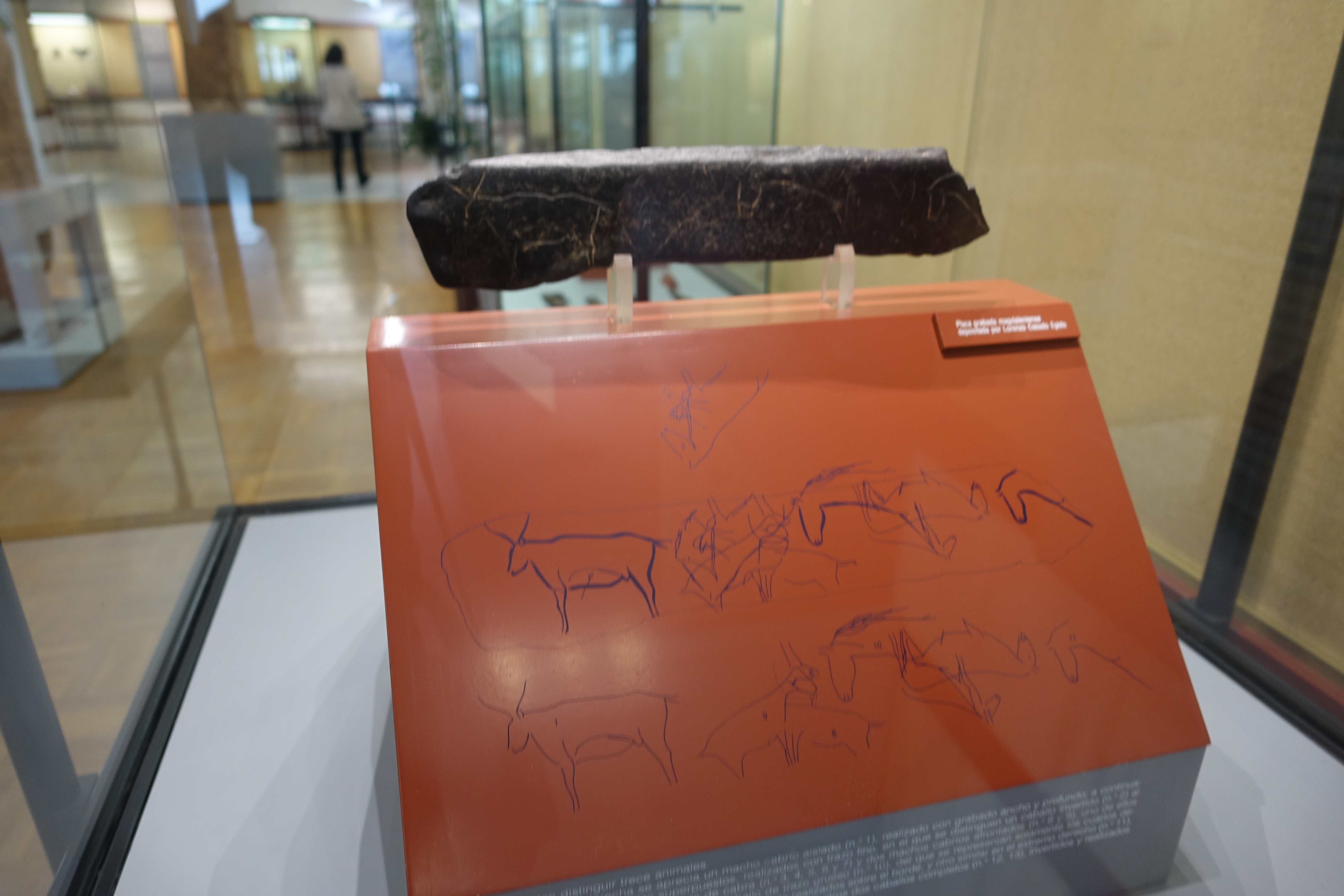 Placa prehistórica de Villalba, depositada en el Museo Numantino de la ciudad de Soria